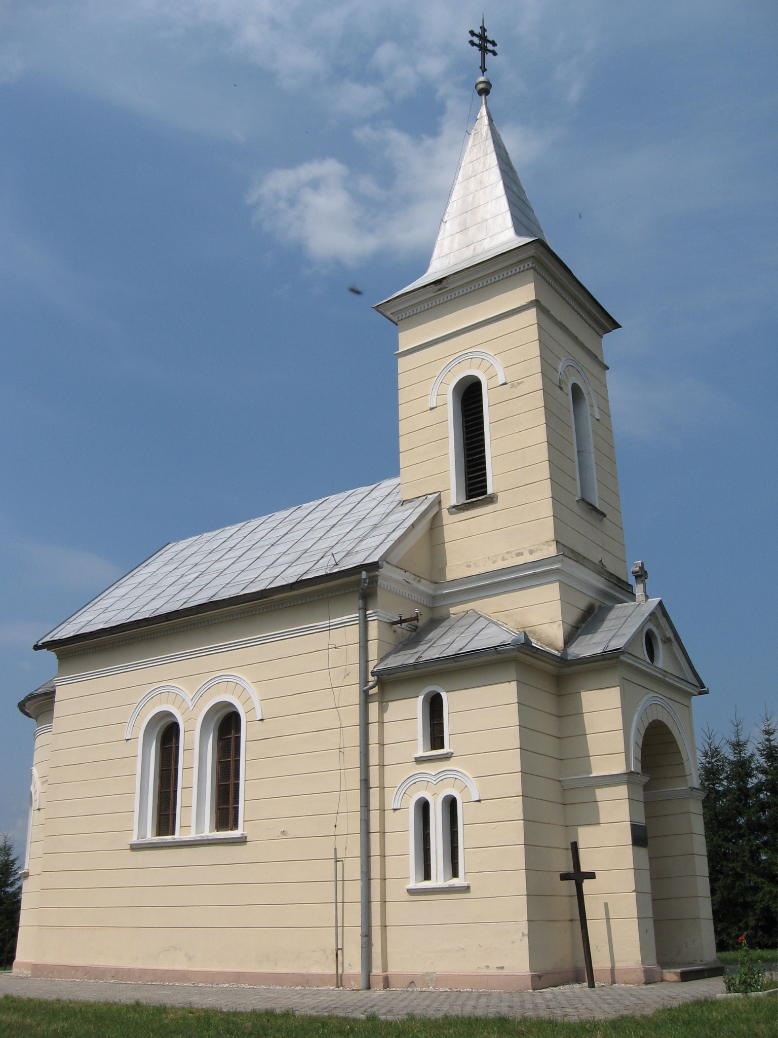 Church sv. Cirila in Metoda, Metlika, Slovenia